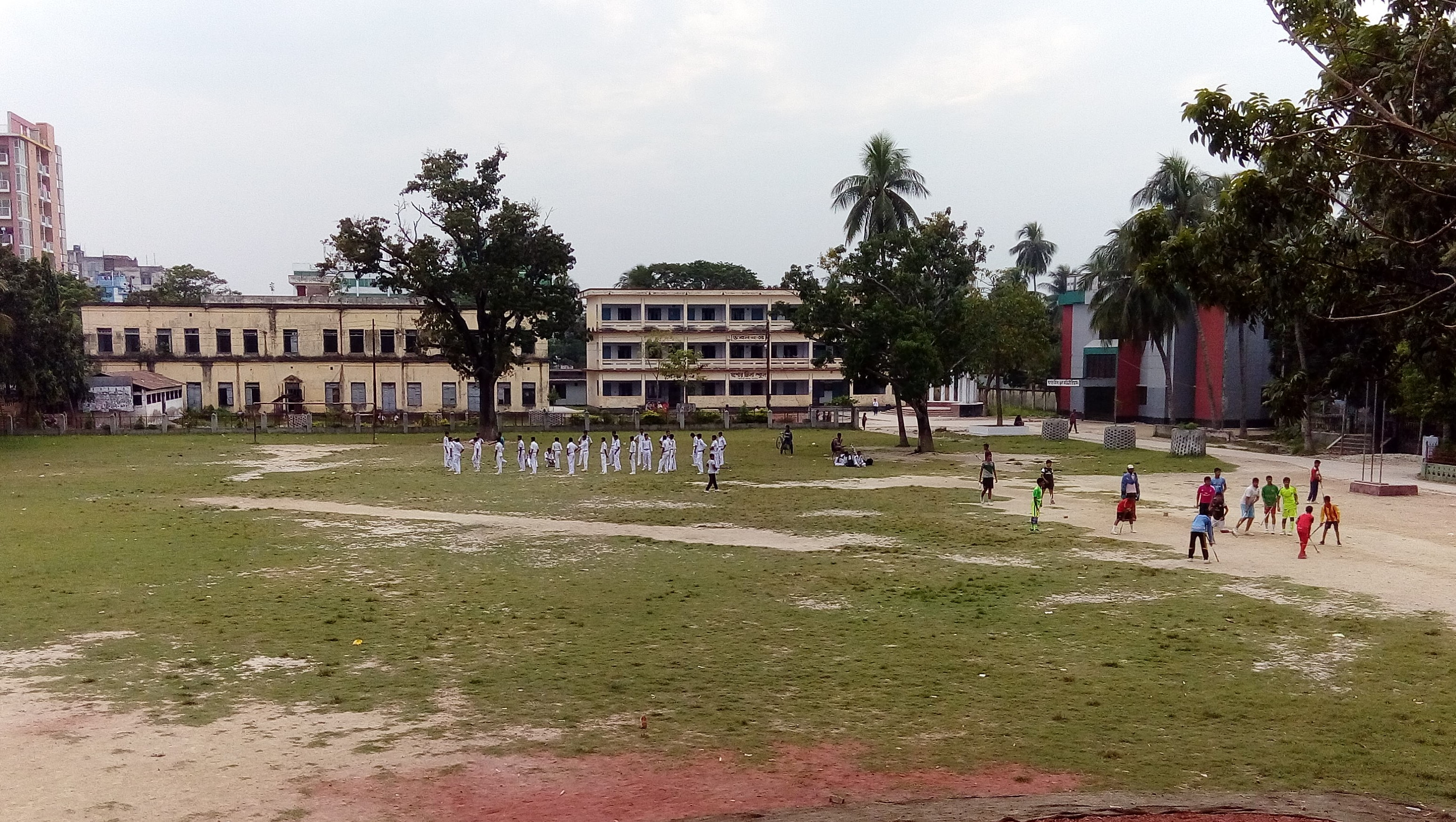 যশোর জিলা স্কুল